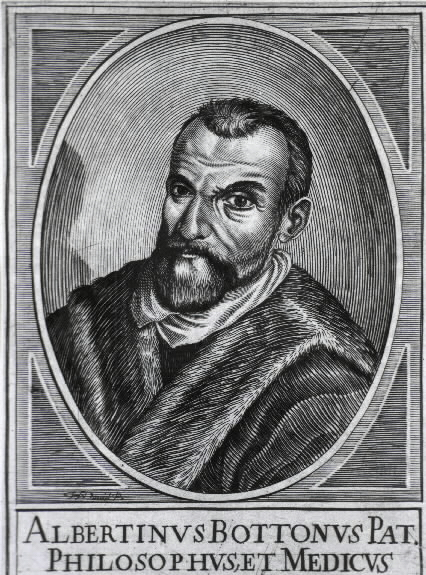 Ritratto di Albertino Bottoni